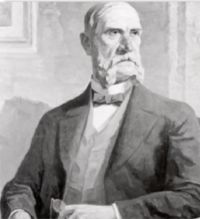 Porträt Theodor Wille (1818-1892)